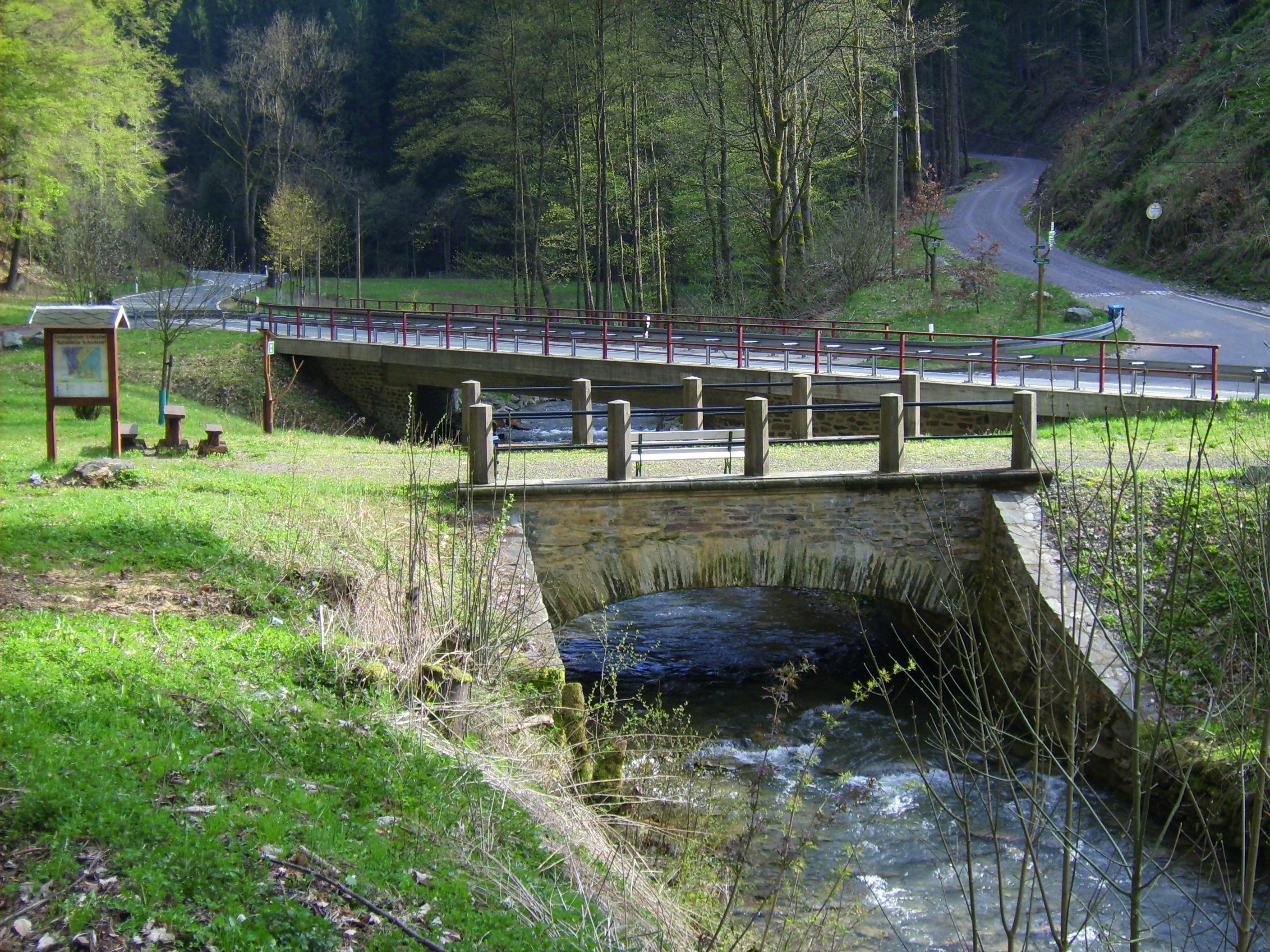 Neben die denkmalgeschützte Rundbogenbrücke wurde 1994 eine neue Straßenbrücke gebaut.